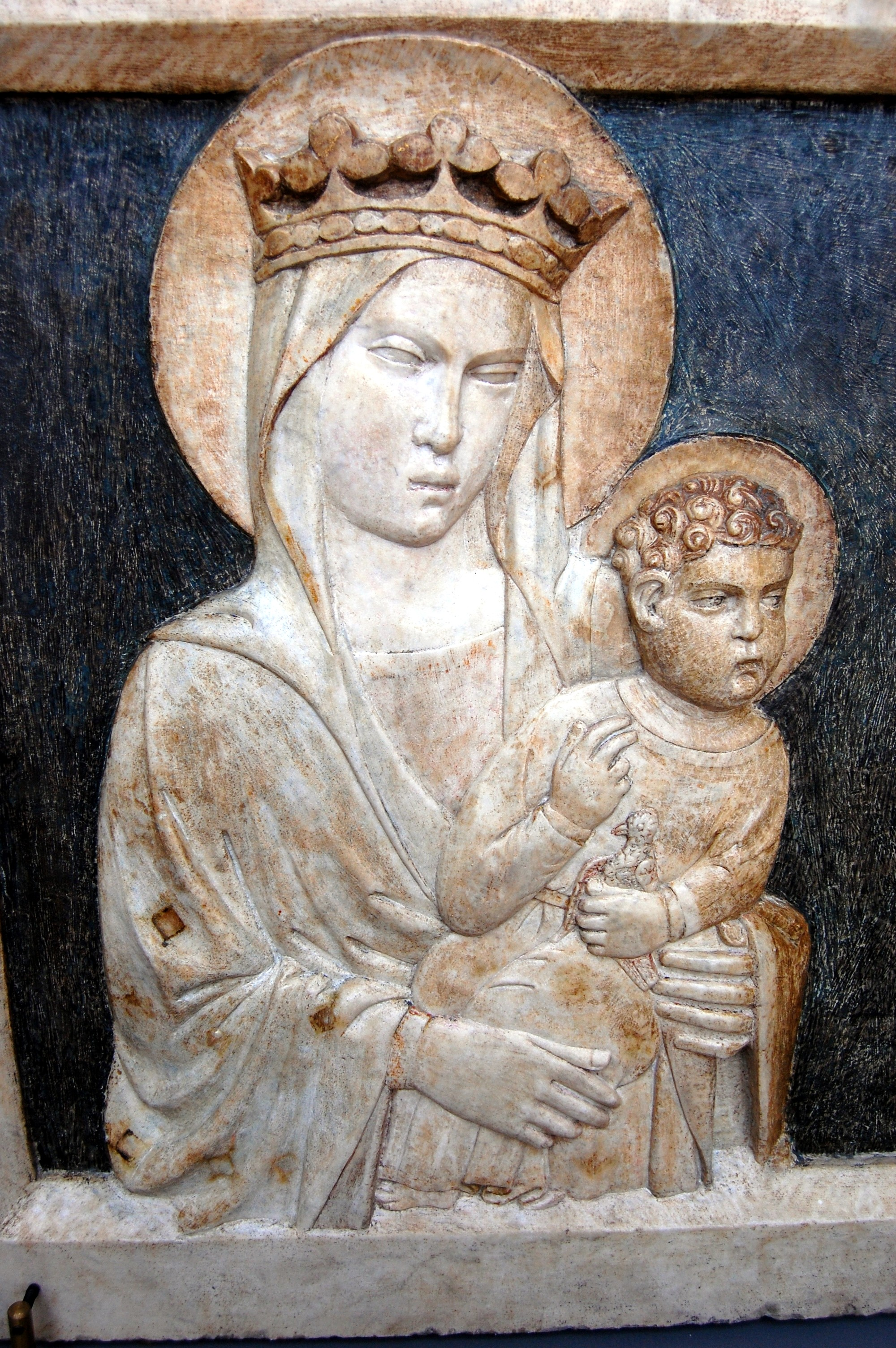 Museo diocesano di Lucera: la Madonna delle stelle.